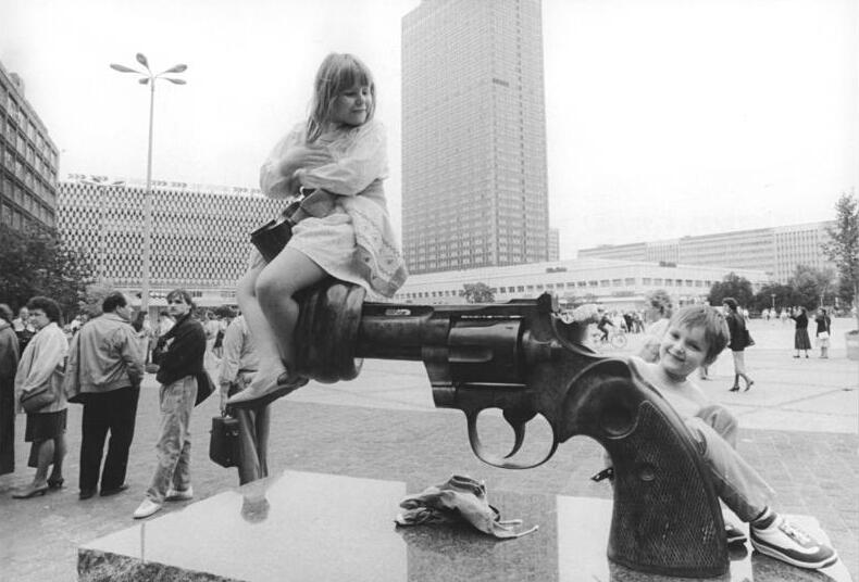 Berlin, Alexanderplatz, Kind auf Plastik ADN-Senft 25.6.1990 Berlin: Denkmal-Den schwedischen Künstler Carl-Friedrich Reuterswärd stört´s bestimmt nicht, wenn Kinder mit seiner "Pistole" spielen - besser mit dieser, als mit "Spielzeugwaffen". Bis Mitte August bleibt die Kopie des Denkmals "Nicht Gewalt" vor dem UNO-Hauptquartier in New York auf dem Alexanderplatz.